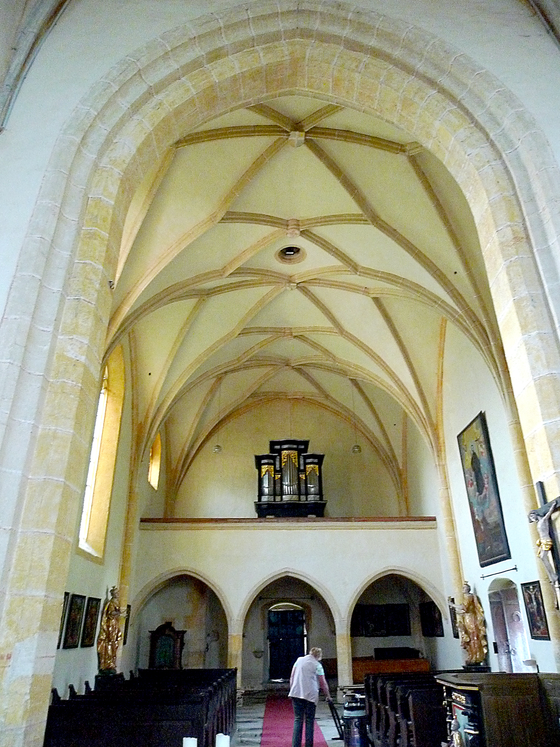 Kath. Filialkirche hl. Stephanus, Filialkirche St.Stephanus Hofkirchen bei Hartberg